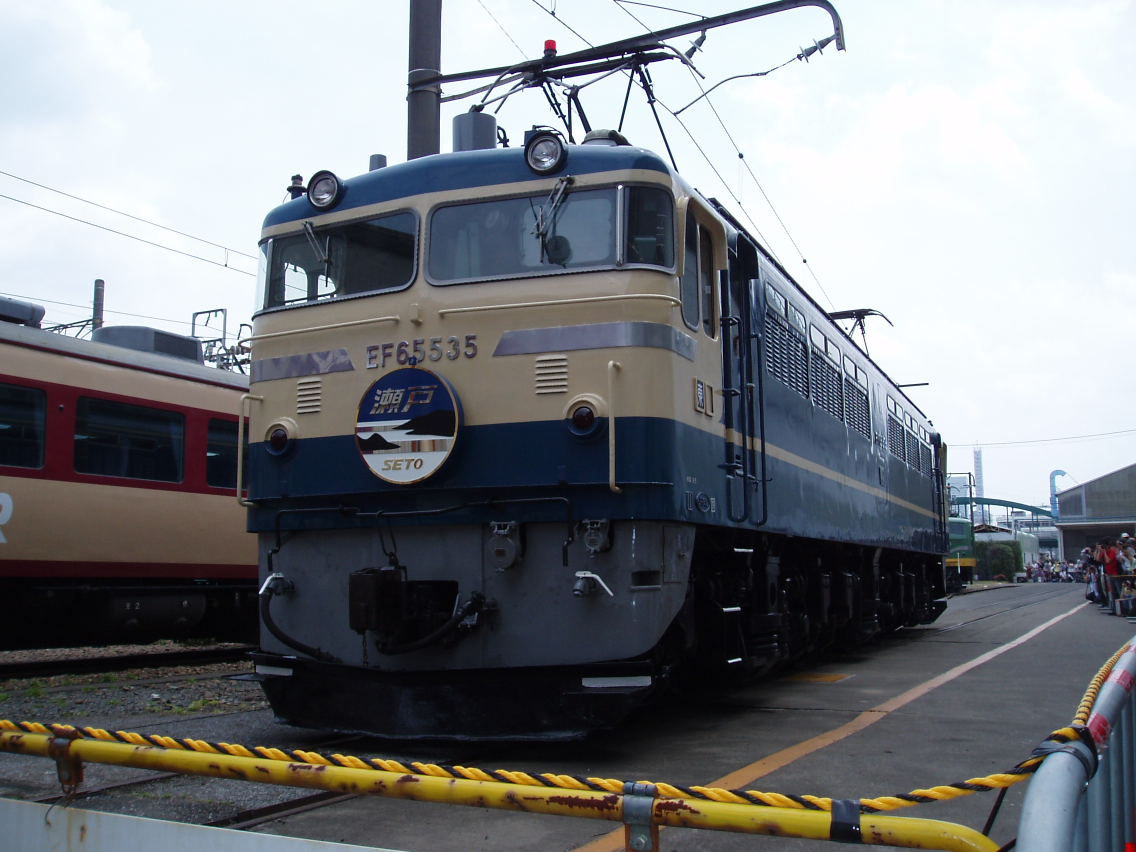 なつかしの「瀬戸」のヘッドマークを付けたEF65 535－「JRおおみや 鉄道ふれあいフェア2009」にて